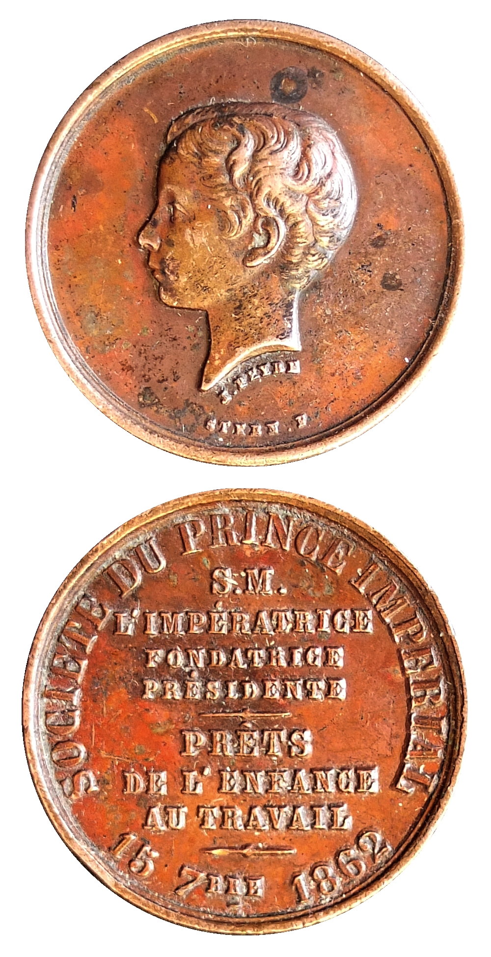 Médaille pour la Société du Prince Impérial, Jules-Constant Peyre graveur. Cuivre, diamètre 27 mm. 7 g. Production maison Stern, Paris, 1862. Avers : tête du prince impérial Napoléon Eugène. Revers : Texte . Collection privée.